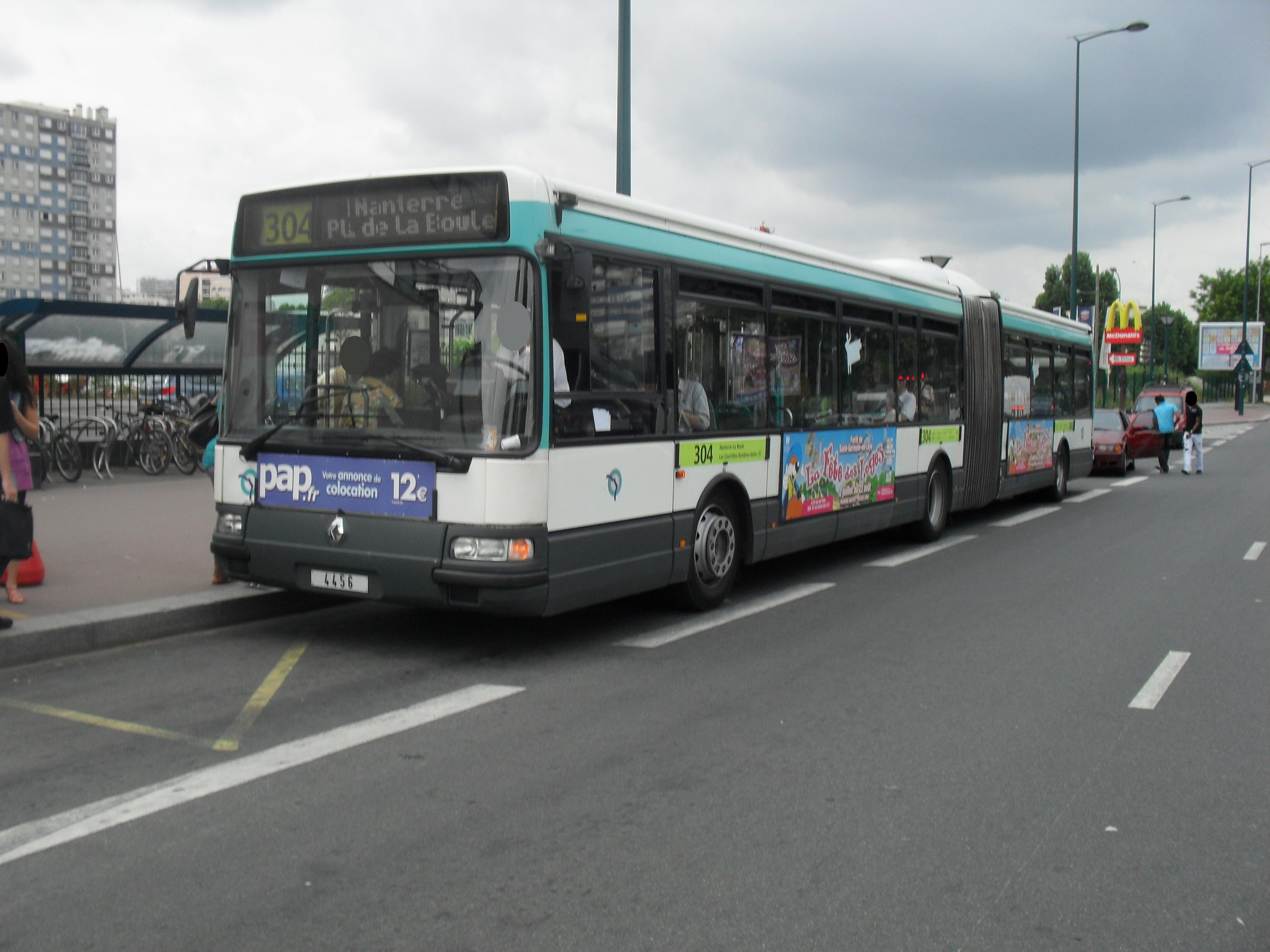 Ligne RATP 304